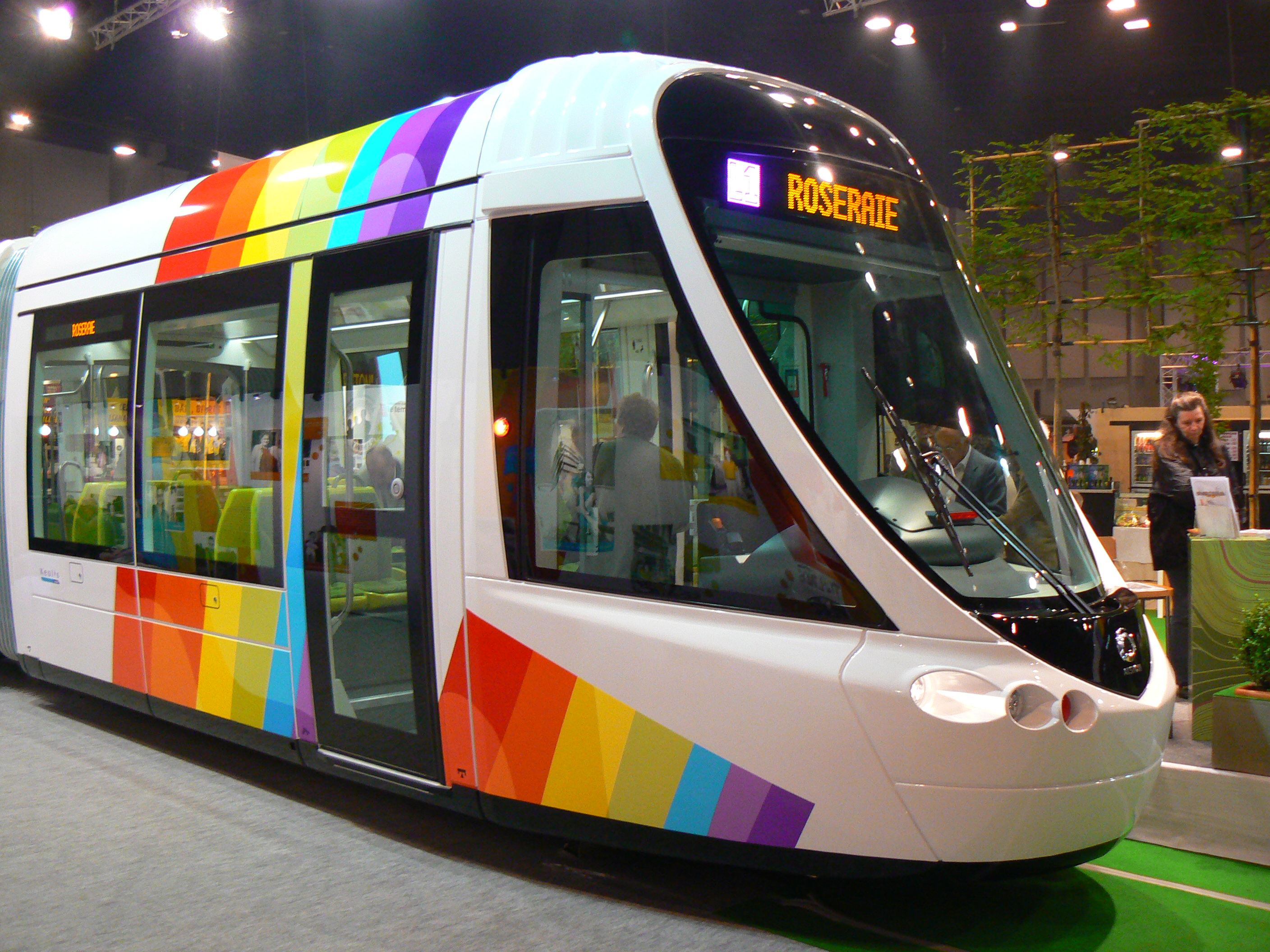 Tramway d'Angers - maquette présentée à la Foire d'Angers en 2007